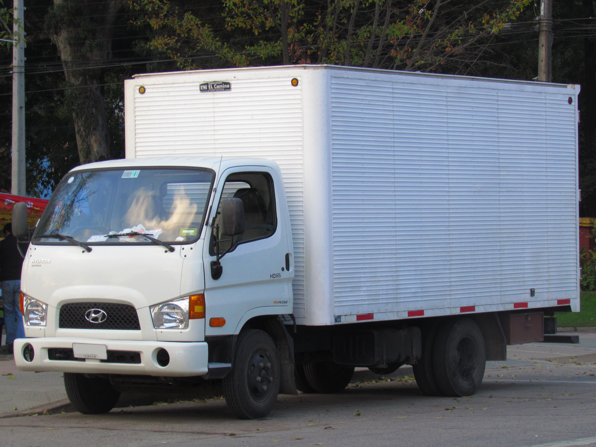 Hyundai HD 65 2011